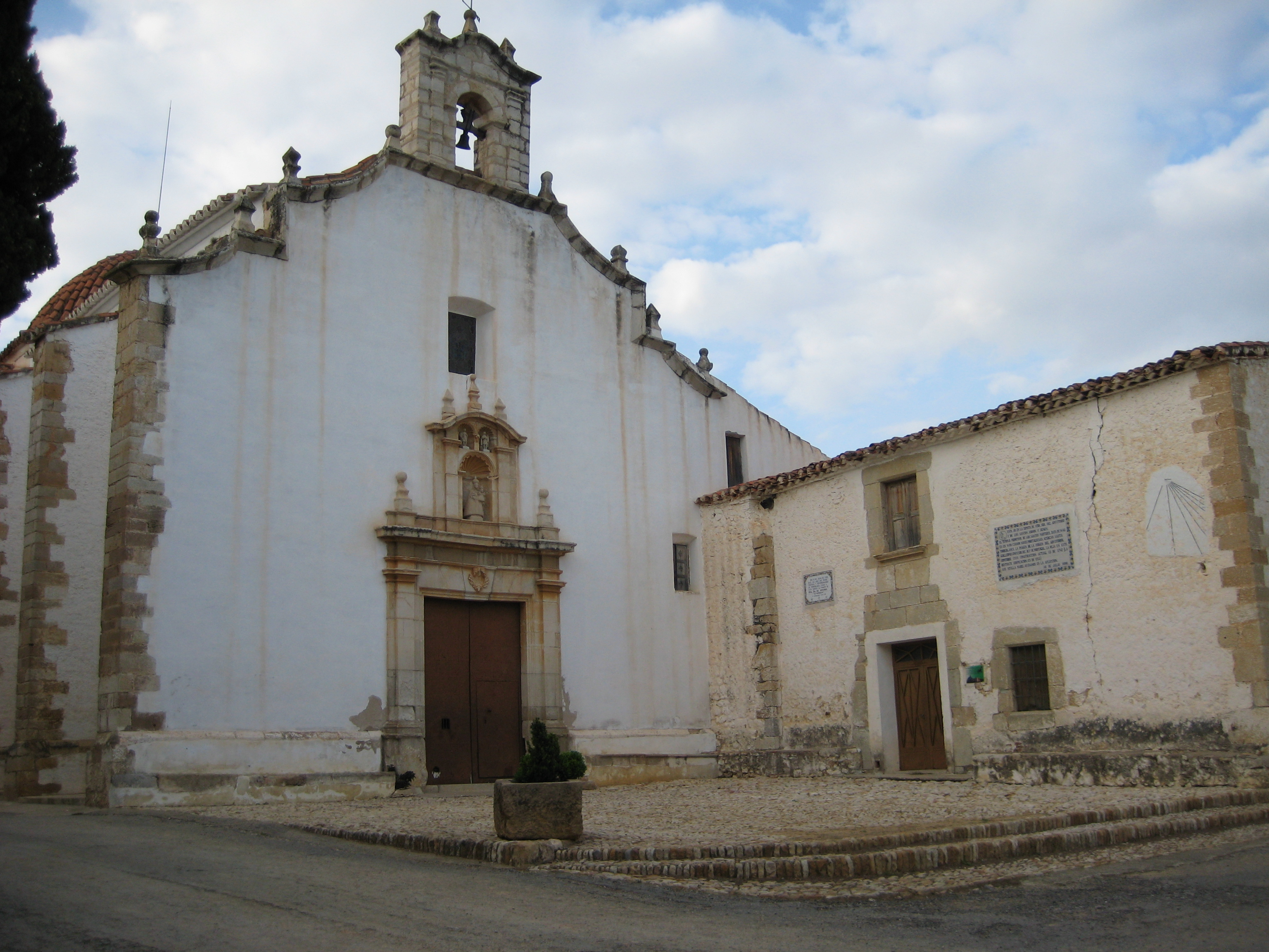 Ermita de la Mare de Déu de l'Adjutori de Bell-lloc (Plana Alta)